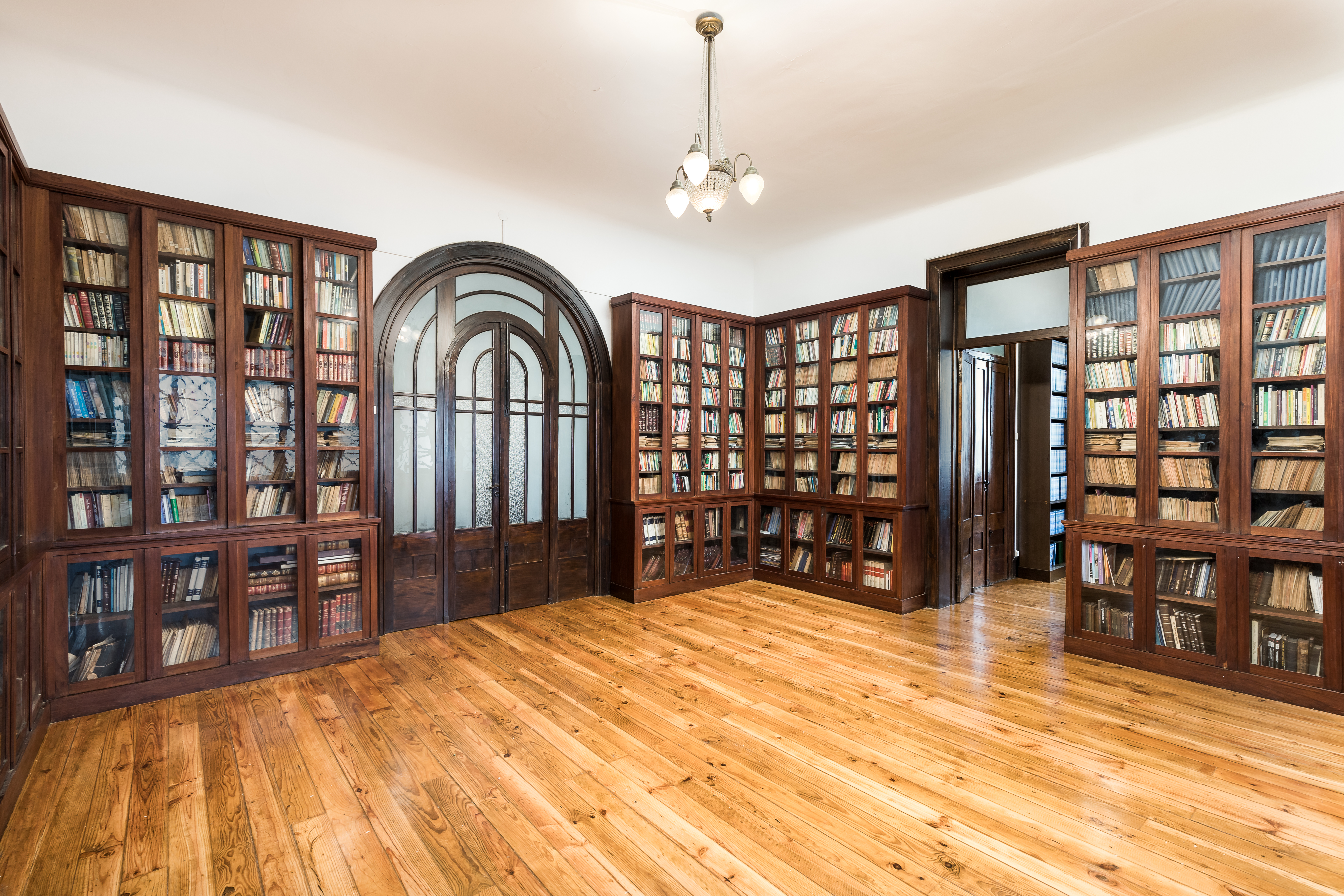 Biblioteca Kadoorie